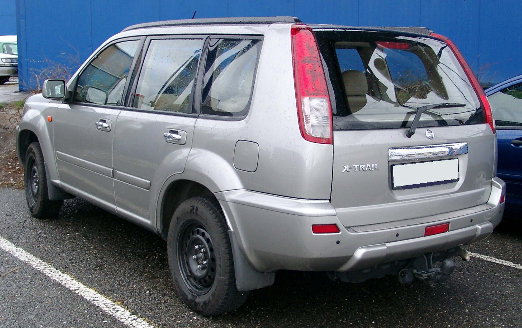 Nissan X-Trail, 1. Generation